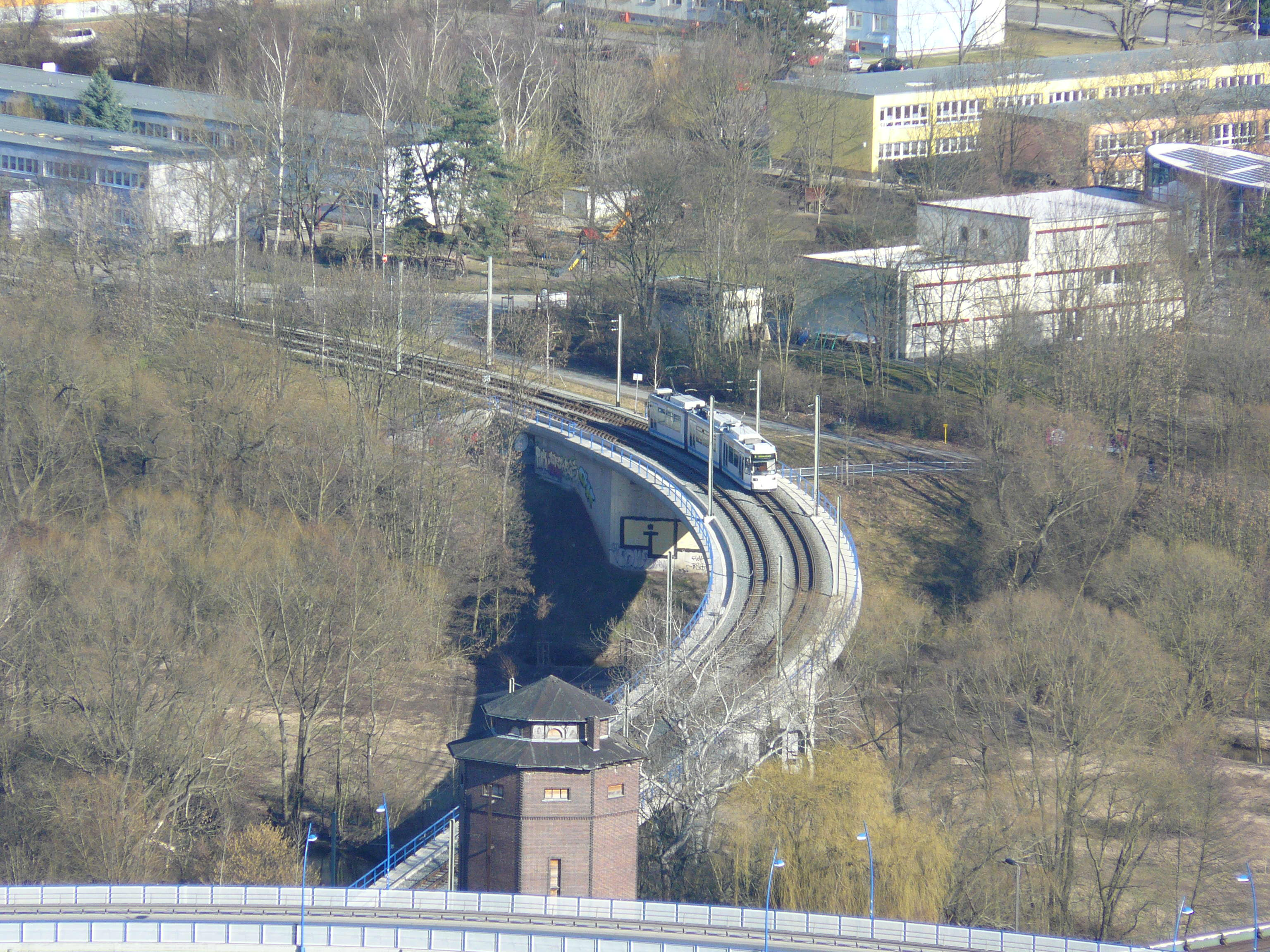 Straßenbahnbrücke über die Saale zwischen Jena-Göschwitz und Lobeda, Triebwagen fährt in Richtung Lobeda. Aufnahme aus ca. 100 Metern Höhe vom Mönchsberg am Rand des ehemaligen Steinbruchs des Zementwerkes und späteren Schießplatzes in östlicher Richtung.